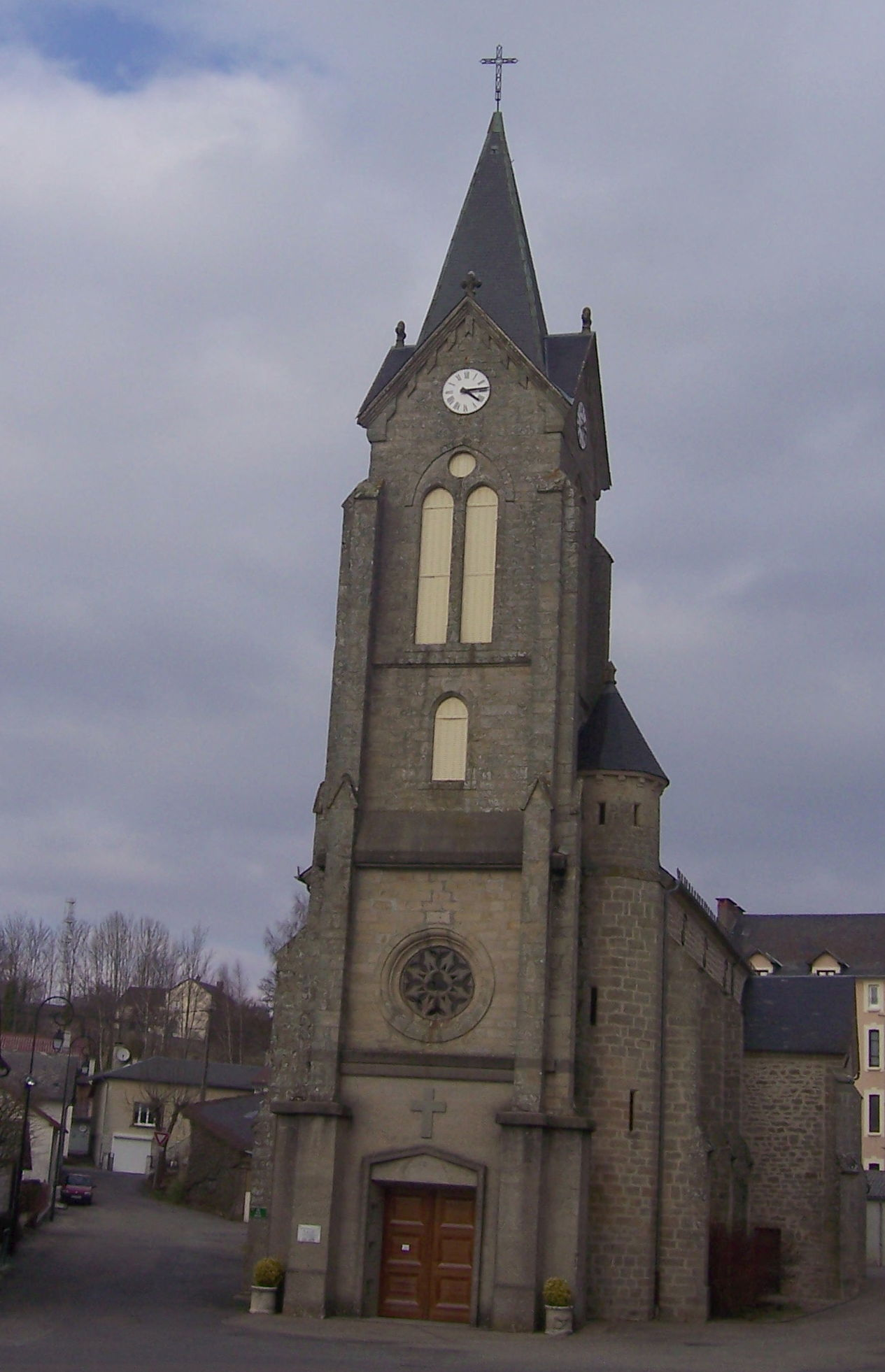 Eglise de Latronquière, vue extérieure.